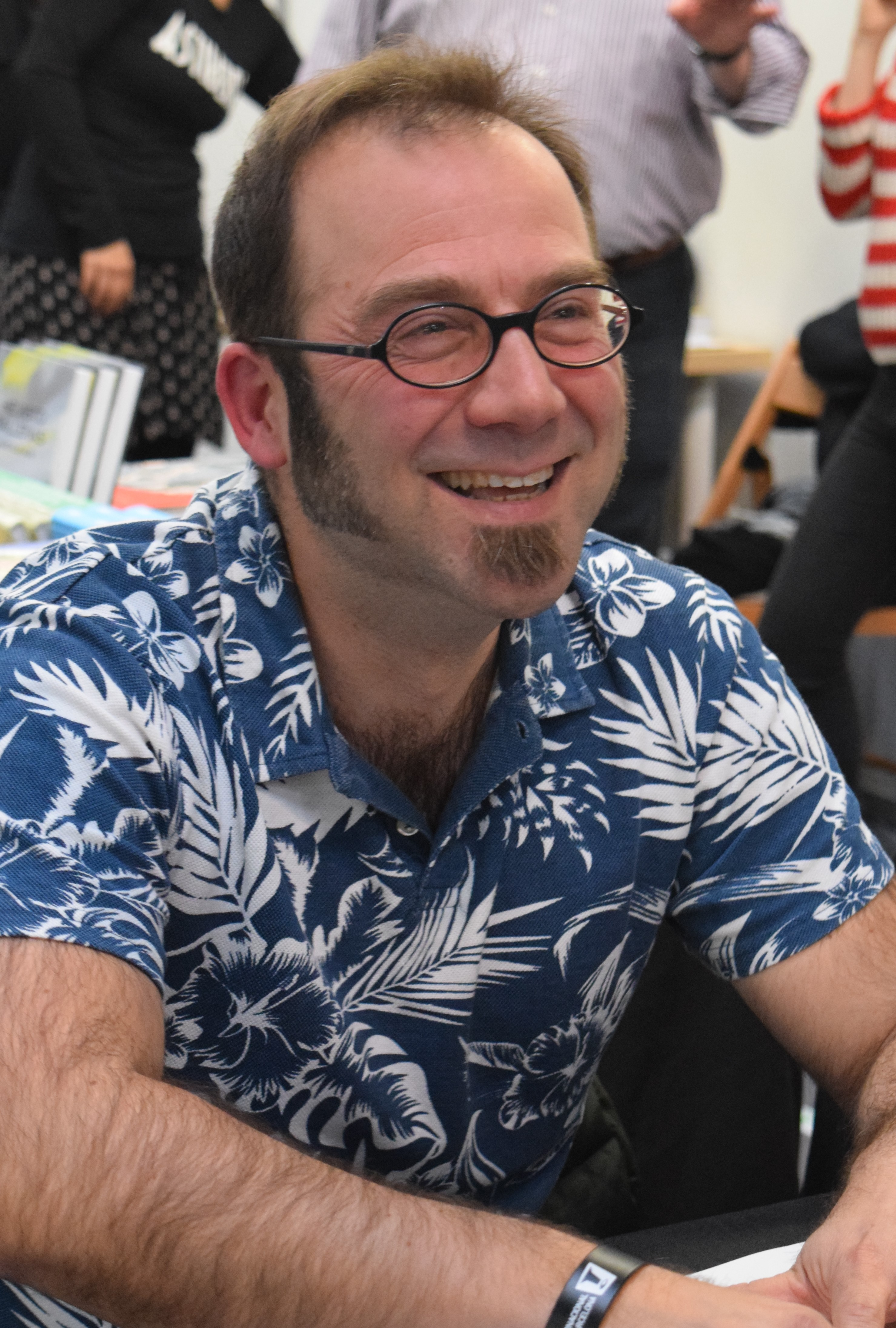 El dibuixant de còmics Pep Brocal al Saló Internacional del Còmic de Barcelona de 2017. Dijous 30 de març de 2017.